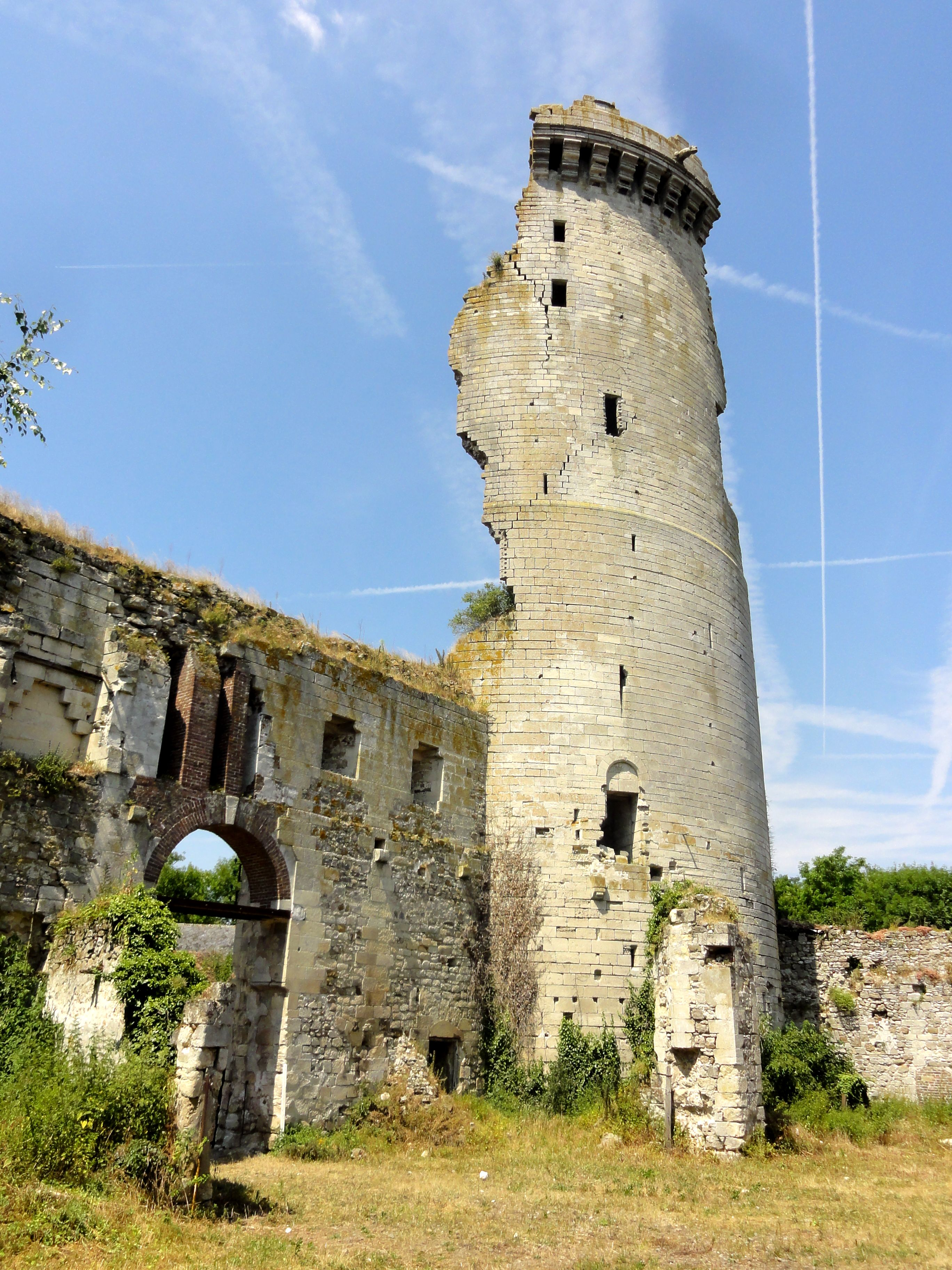 Courtine du château neuf et donjon, vue depuis le sud-est.